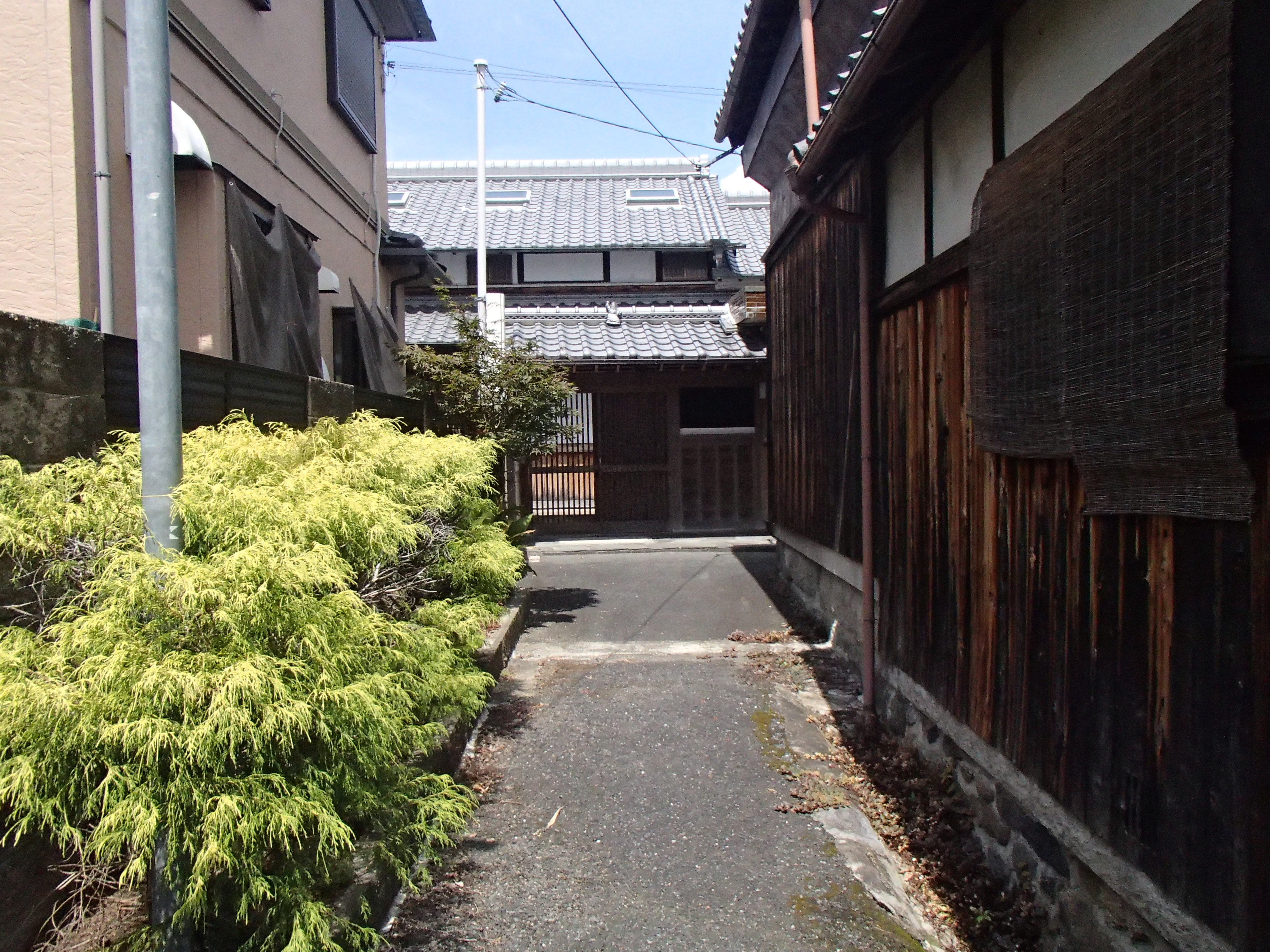 集落内の路地